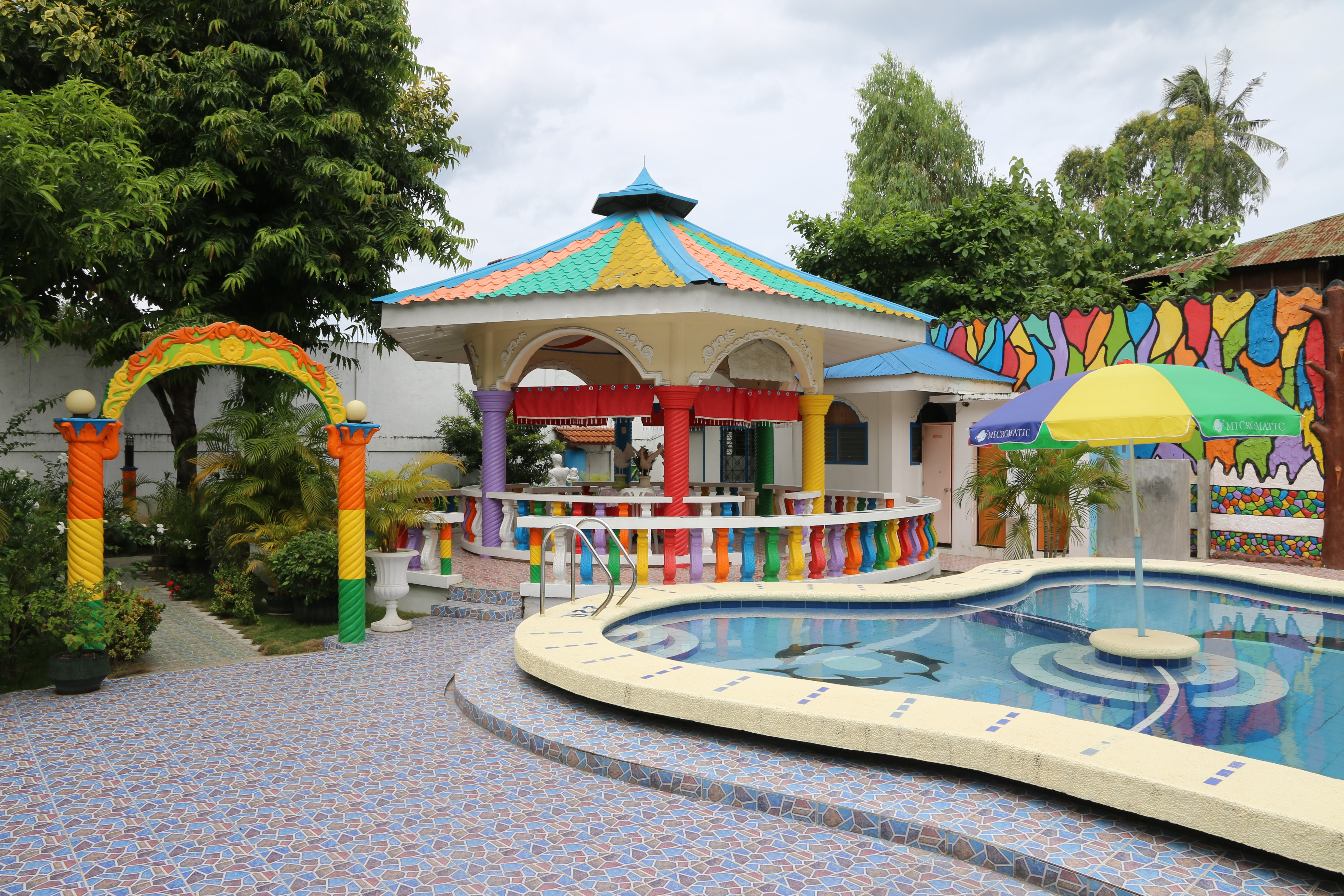 Japaneese house in Talisay, Cebu City.